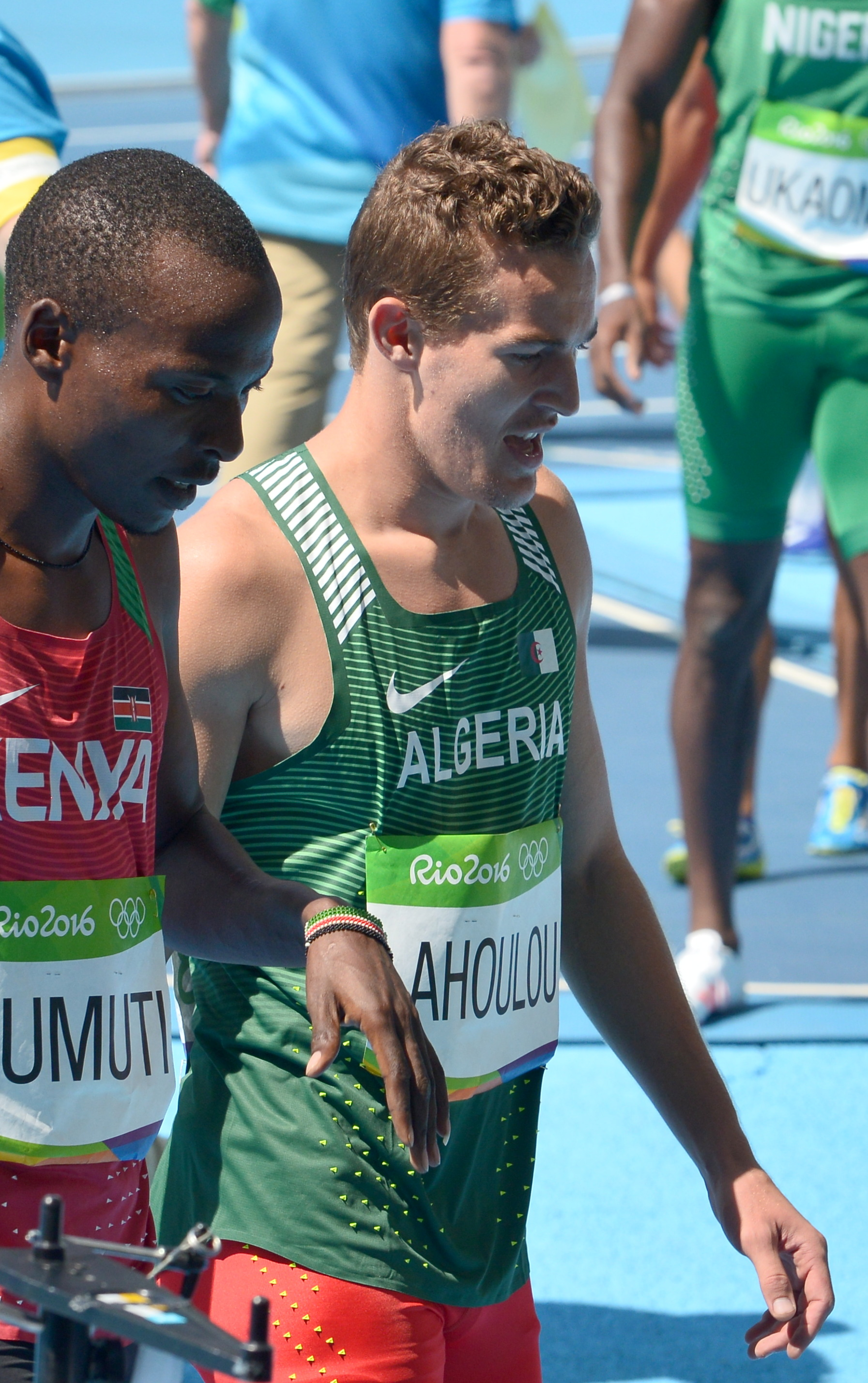 Quelques séries du 400m haies des jo de Rio 2016